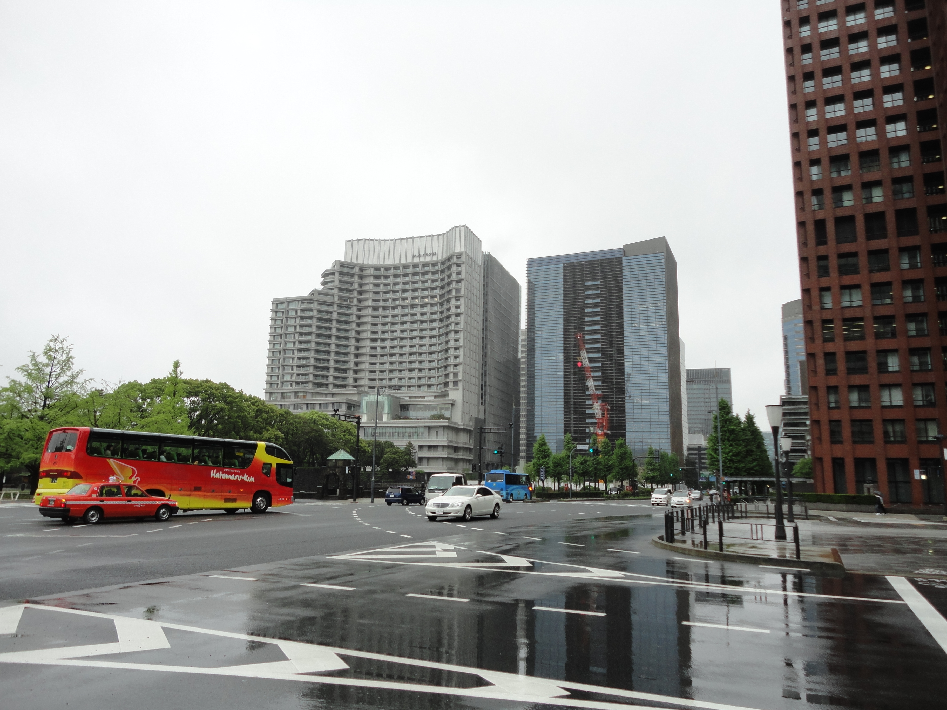 丸の内